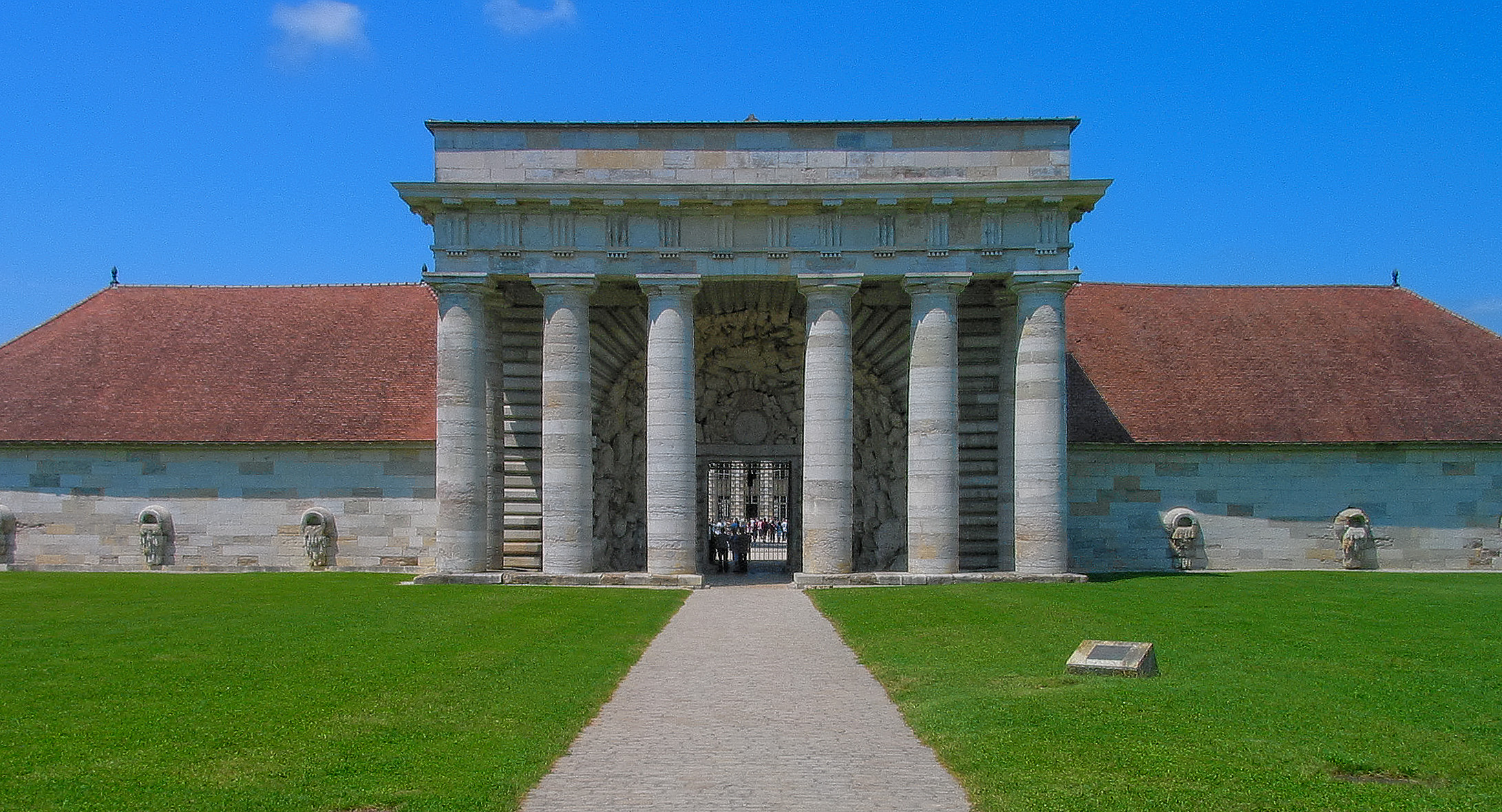 Entrance of Saline Royale at Arc et Senans, France